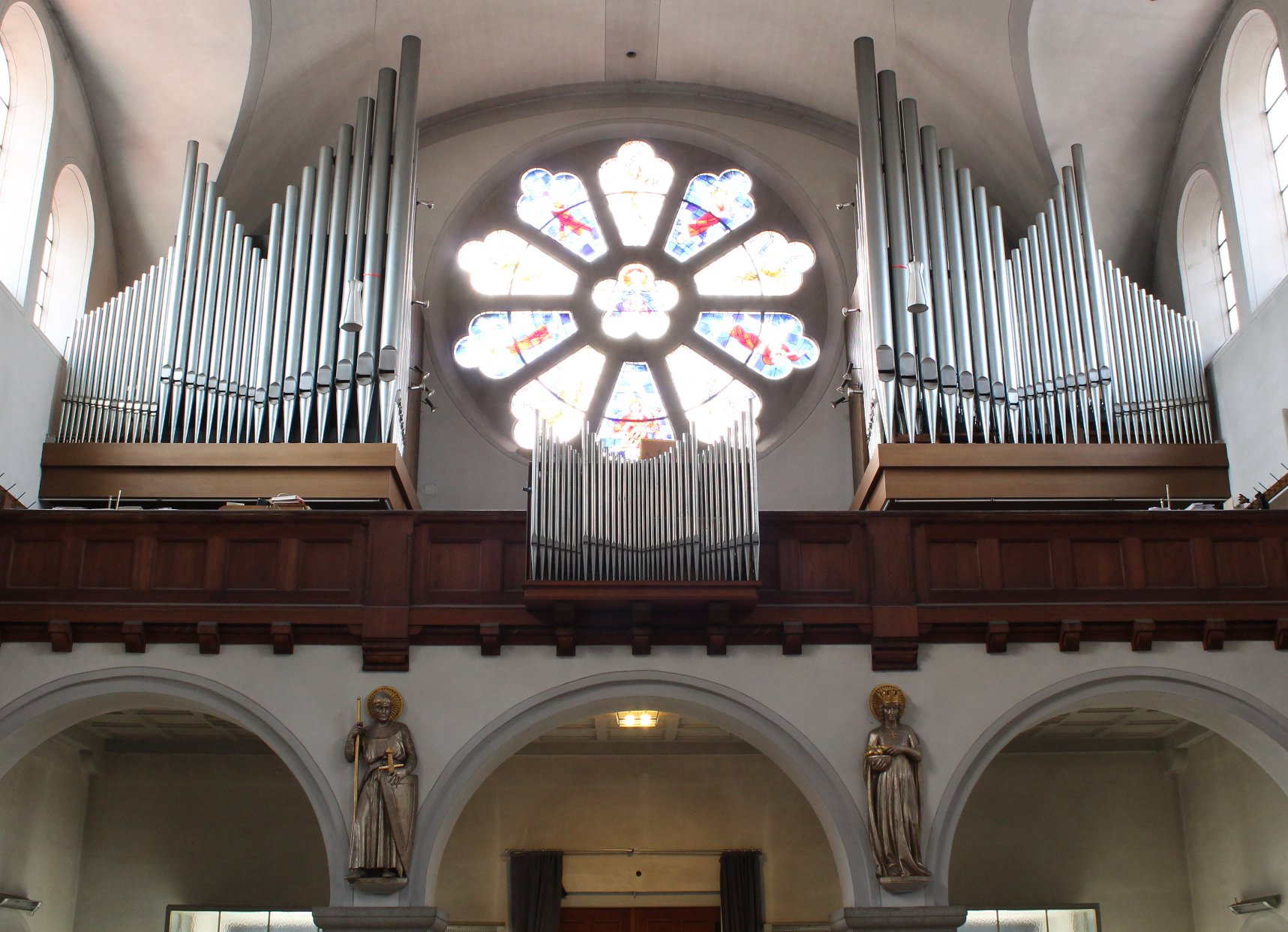 Orgel von Maria-Schutz in München-Pasing (1968, Carl Schuster, III/52)